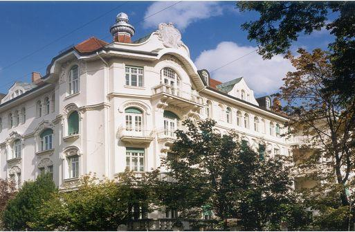 Friedrichstr 18 in München